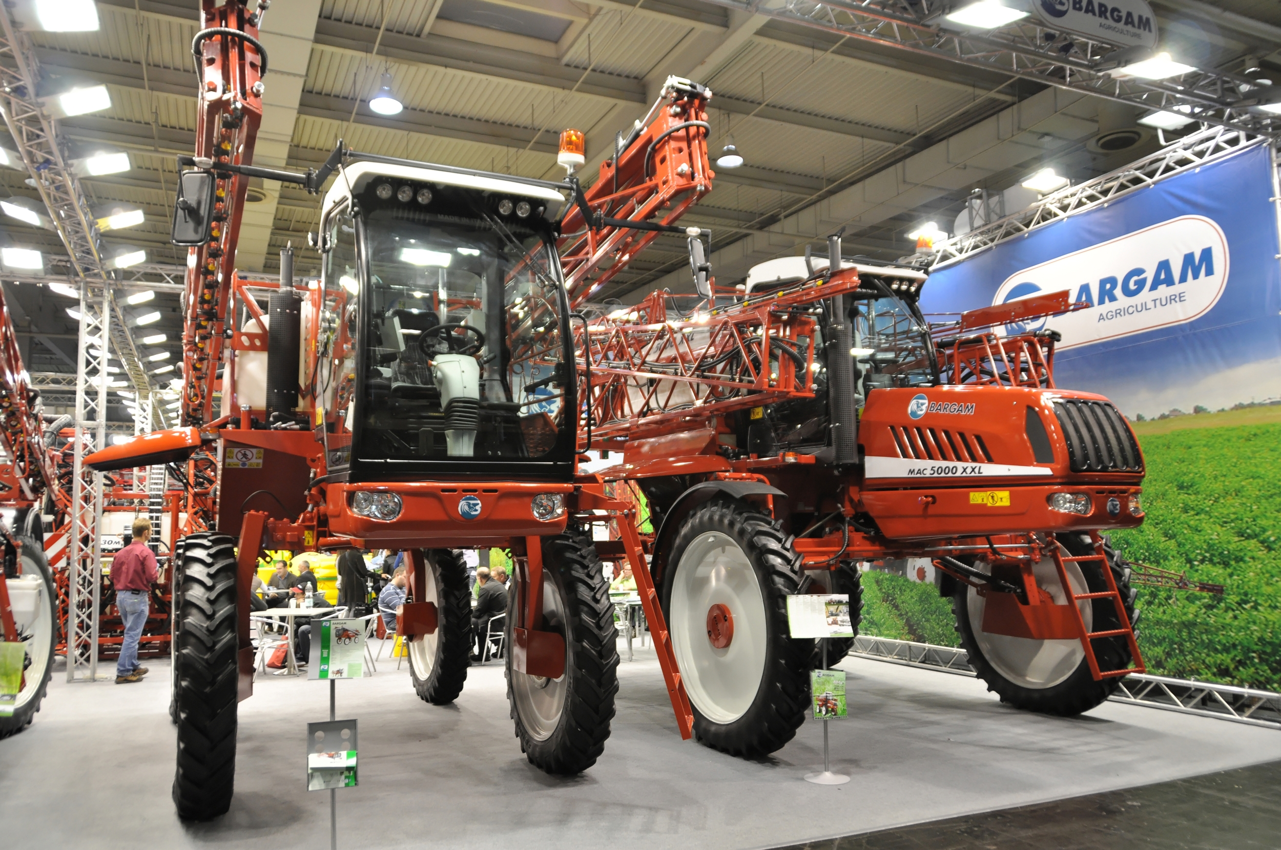 Bargam-Selbstfahrspritzen, Agritechnica 2011 Dieses Foto entstand durch die Mithilfe der Wikimedia Deutschland e. V. bei der Akkreditierung als Fotograf. Wikimedia Deutschland e. V. hilft den Freiwilligen der Wikipedia bei der Erstellung von freien Inhalten.